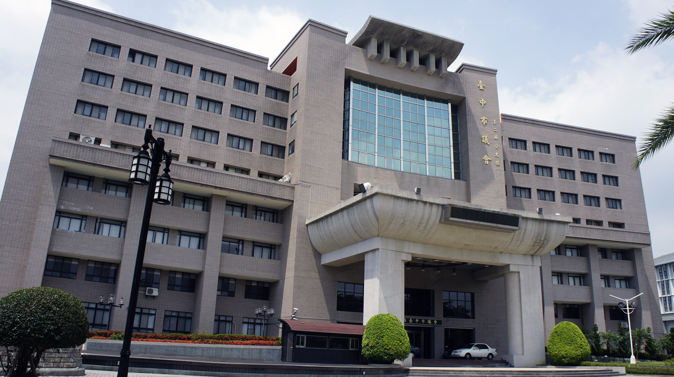 臺中市議會第二議會大樓